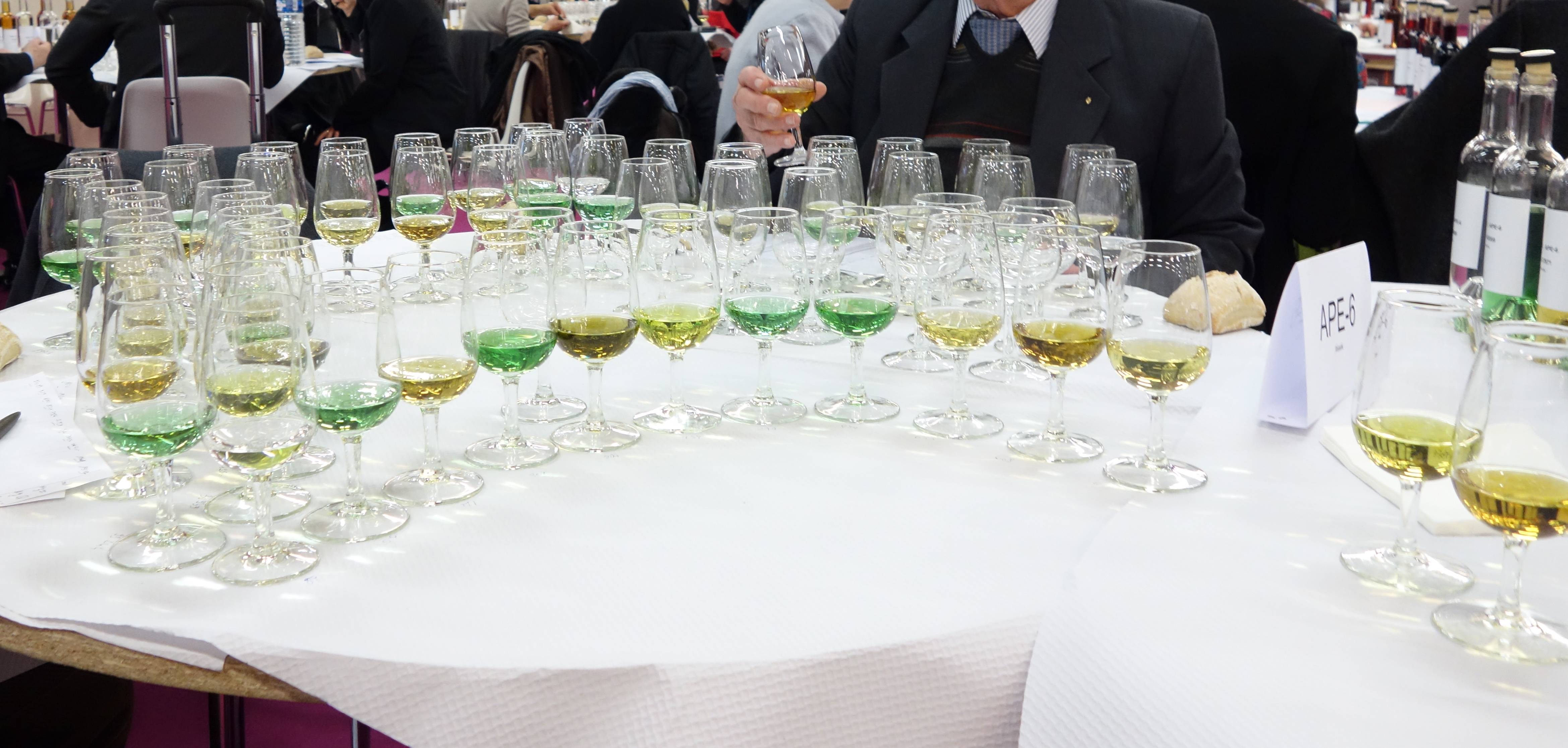 Dégustation d'absinthe au Concours Général Agricole de Paris. Analyse de la couleur et de l'arôme avant ajout de l'eau.